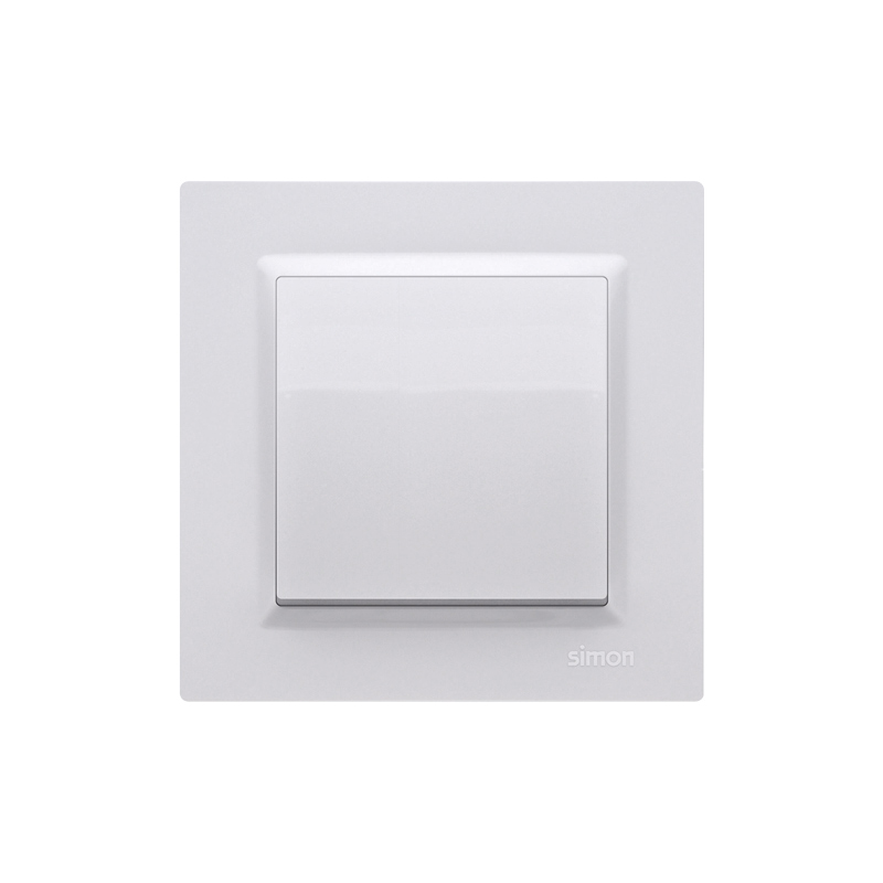 Łącznik jednobiegunowy serii Simon 10. Nazwa producenta: KONTAKT - SIMON Spółka Akcyjna.